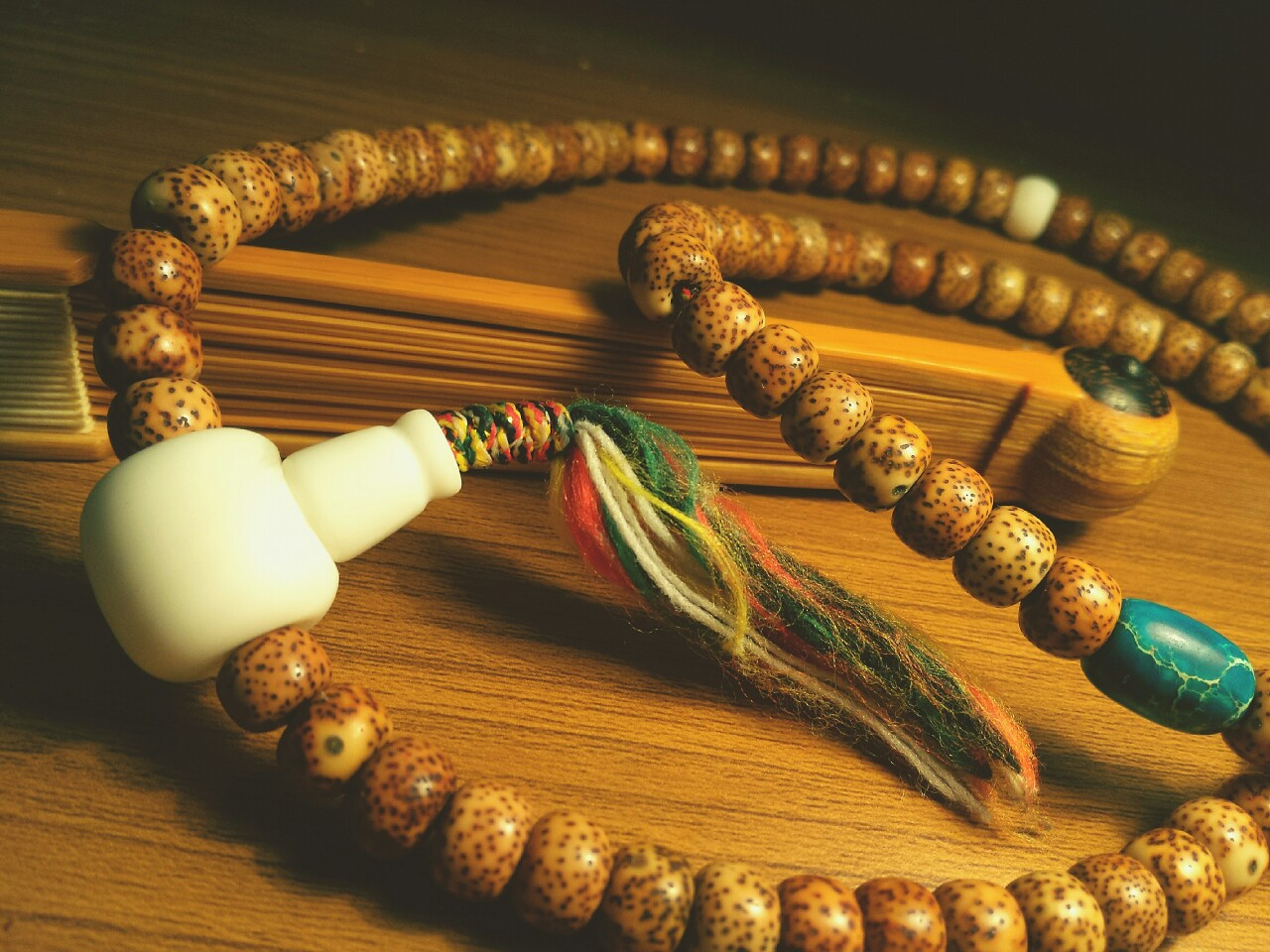 中文（中国大陆）: 星月菩提材质佛珠与玉竹材质中式折扇（局部） 中文（中国大陆）: Prayer beads（Buddhism）